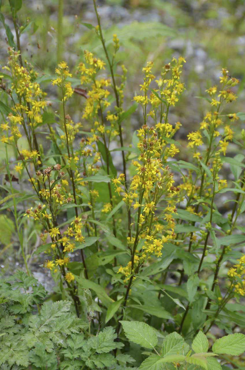 Solidago virgaurea subsp. virgaurea - Gewöhnliche Echt-Goldrute